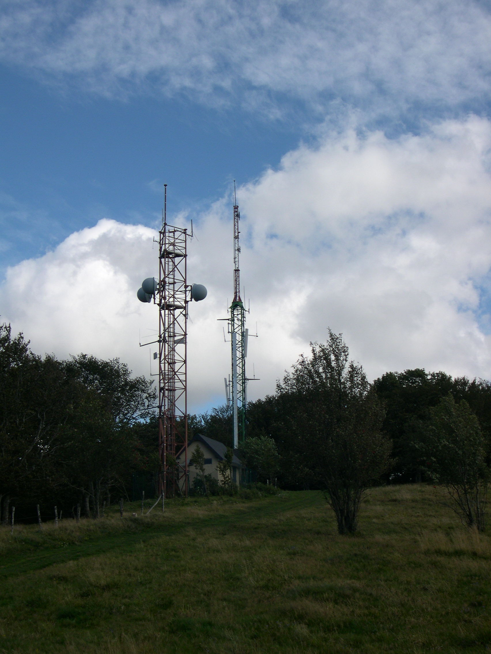 Le site de télécommunication (cote 1101m) du Molkenrain dans le massif des Vosges, Haut-Rhin. Accès pedestre à partir de la Ferme Auberge 1060m.